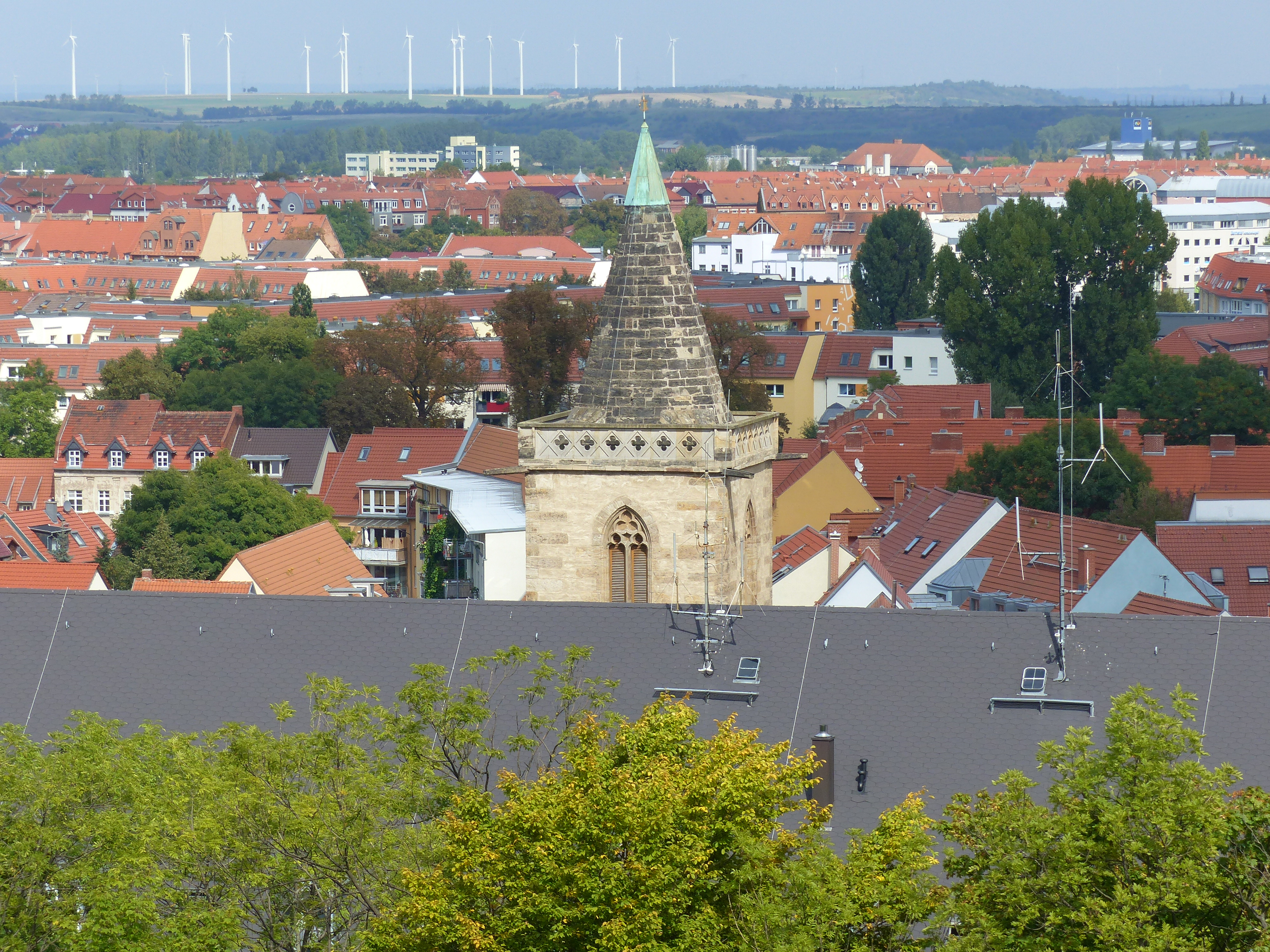 Blick auf den Turm der Andreaskirche in Erfurt von der Zitadelle aus